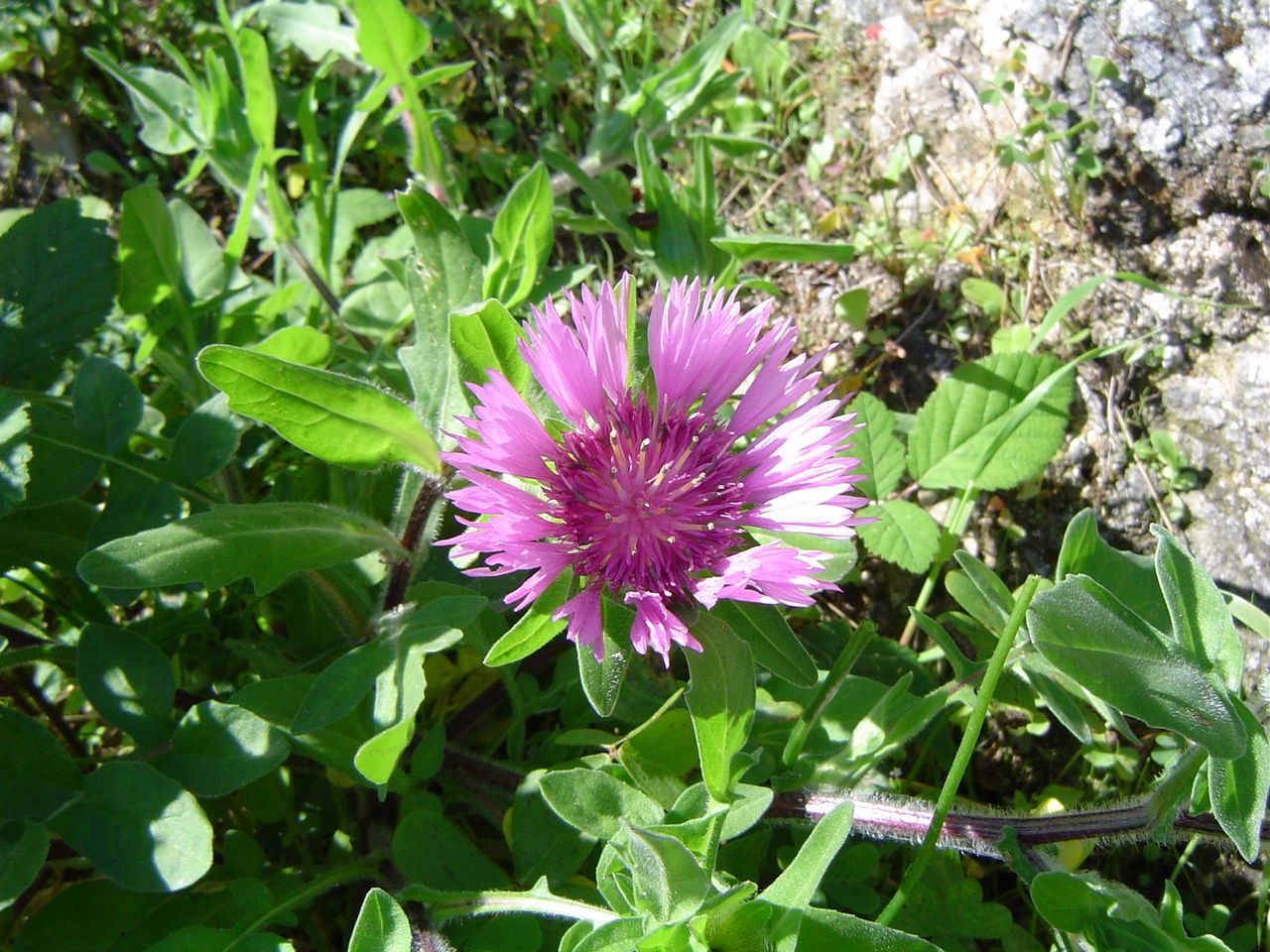 Centaurea pullata, Ceuta, España